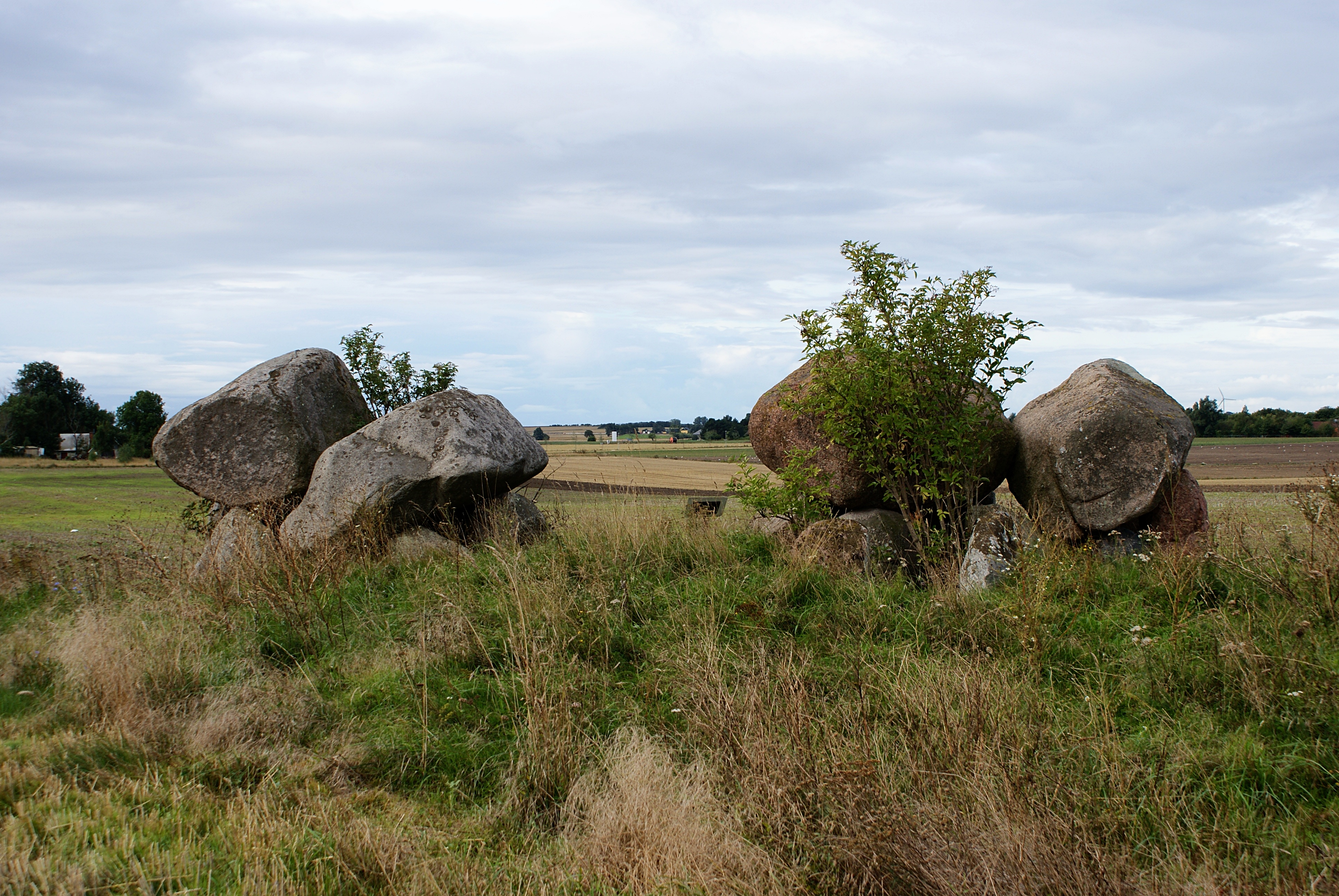 Dubbelgånggrift i Snarringe.